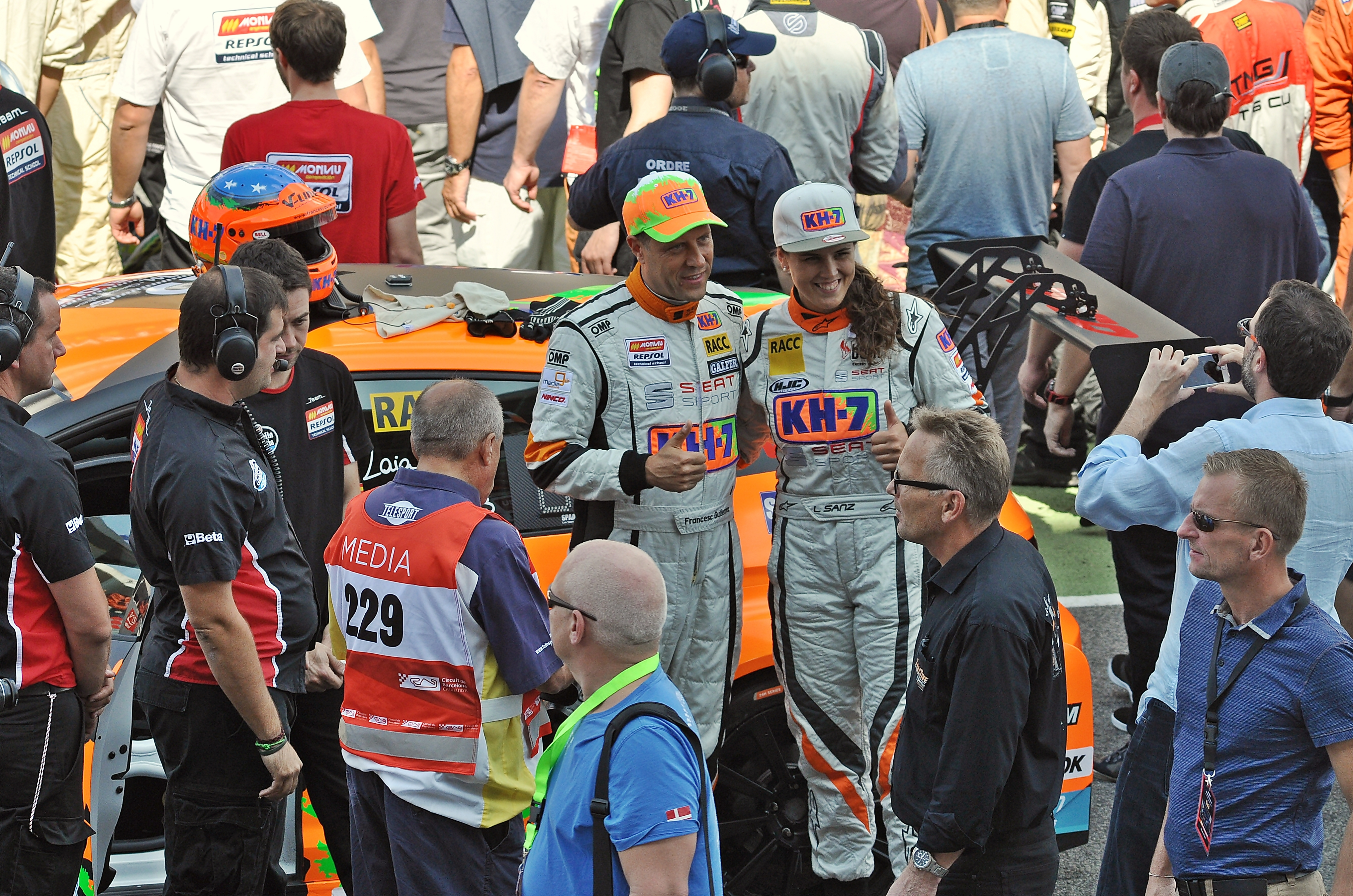 24 horas de barcelona 2015-circuito de cataluña